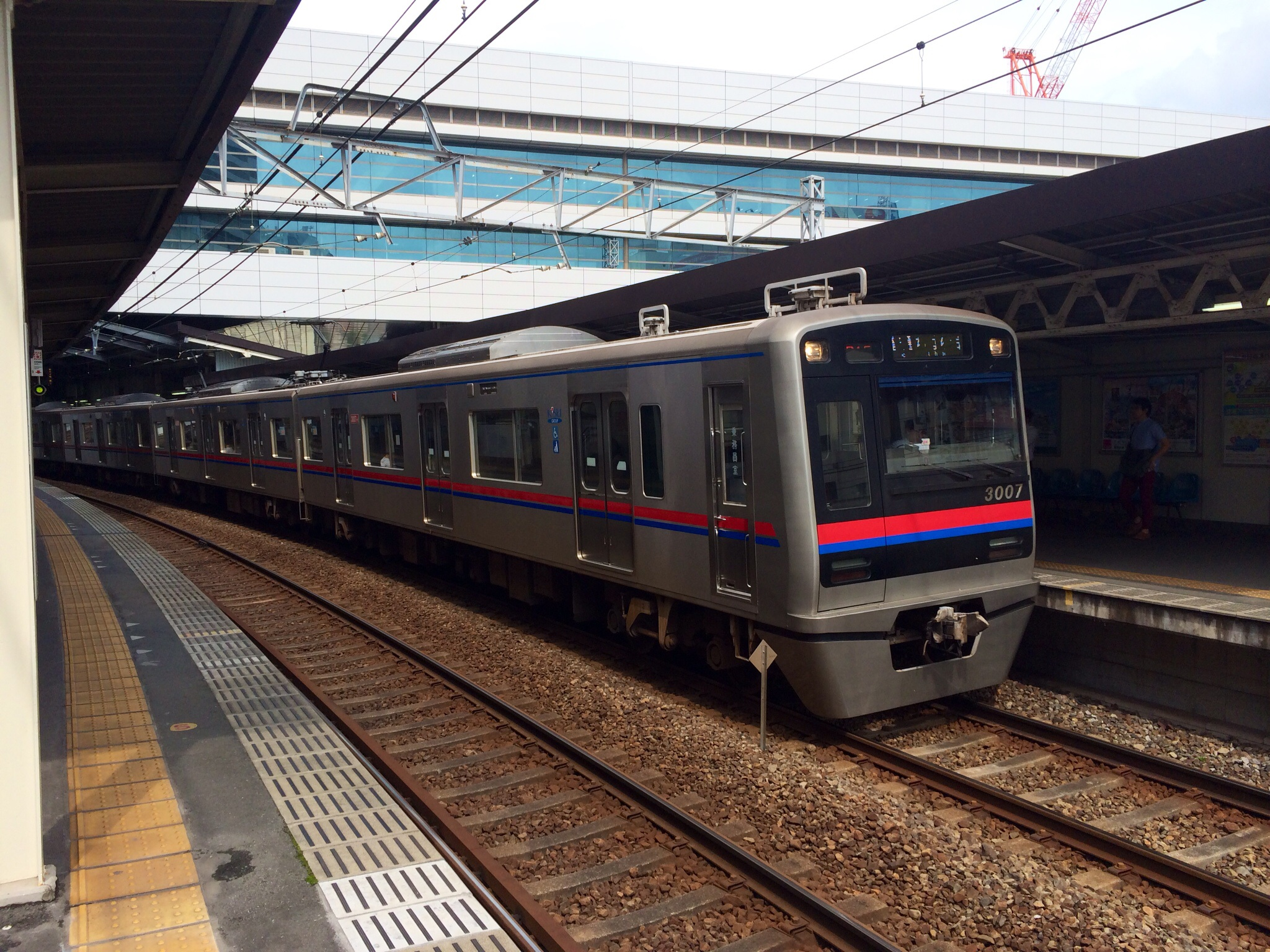 京成千葉線京成千葉駅の3000形